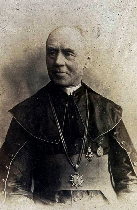 Antonín Kropsbauer, děkan děčínské farnosti